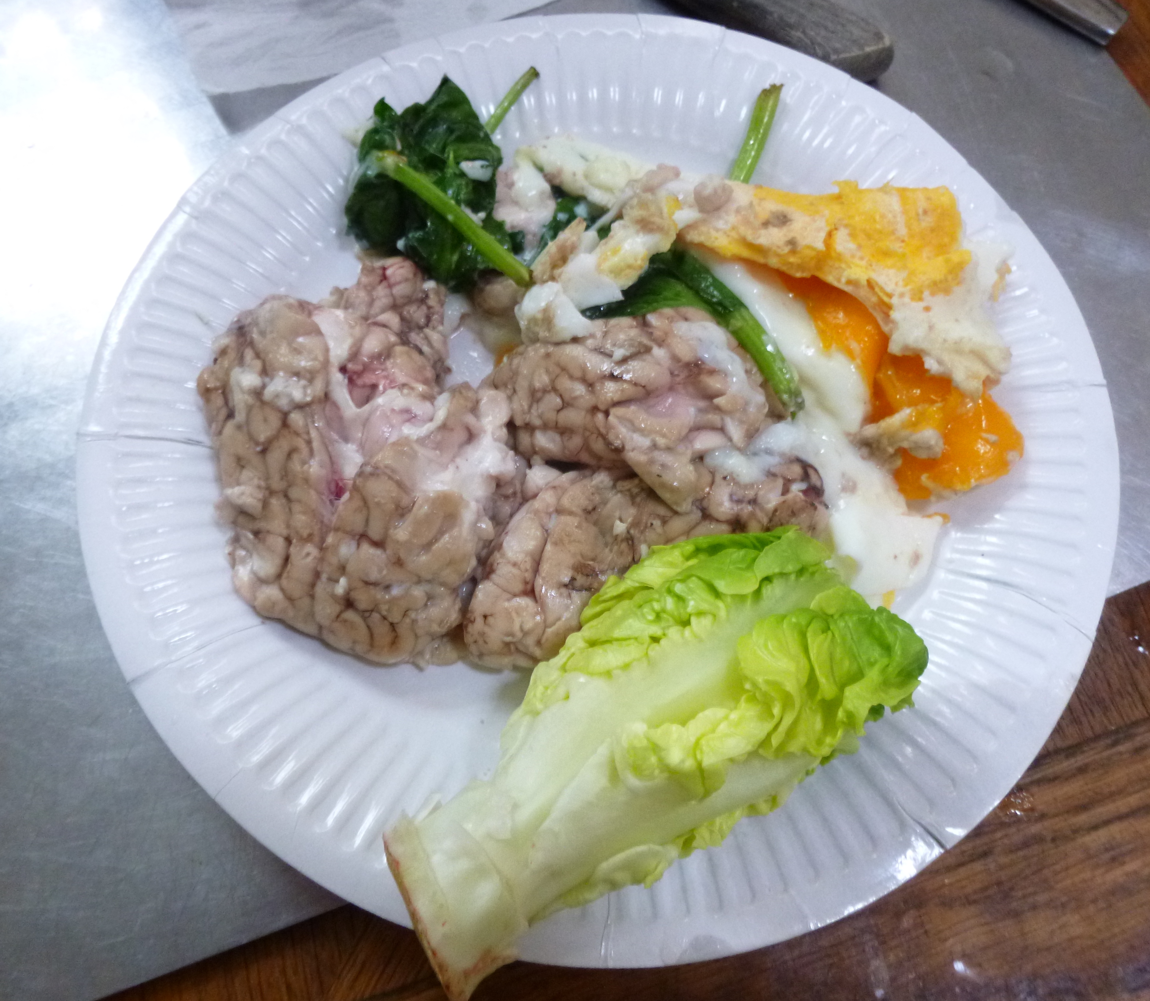 Recette paleo - cervelle de porc cuite à l'a poêle + salade + cresson + œufs